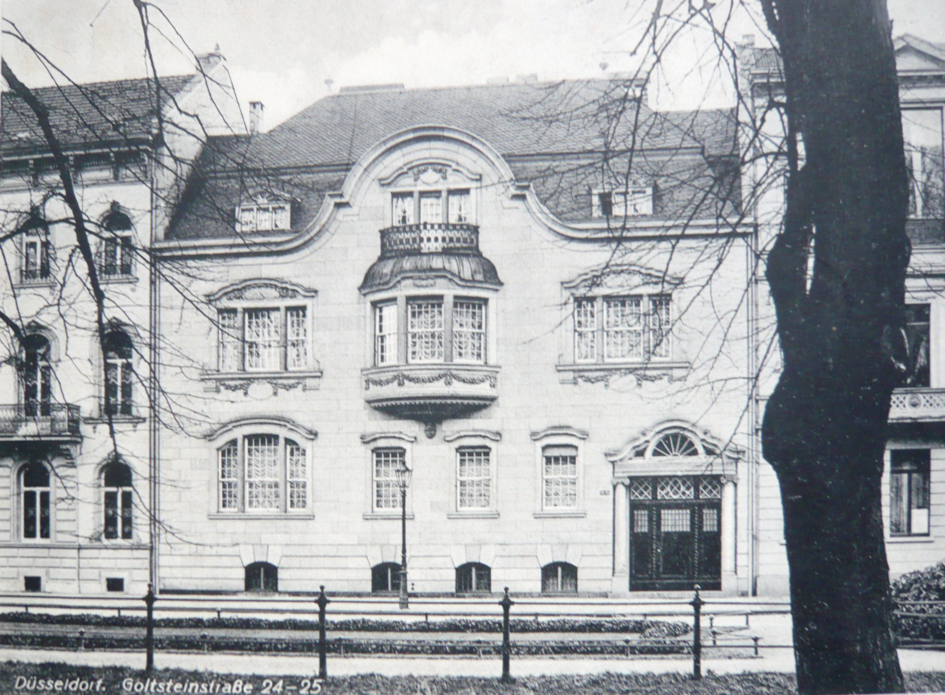 Haus Goltsteinstraße 24-25 Düsseldorf, 1920